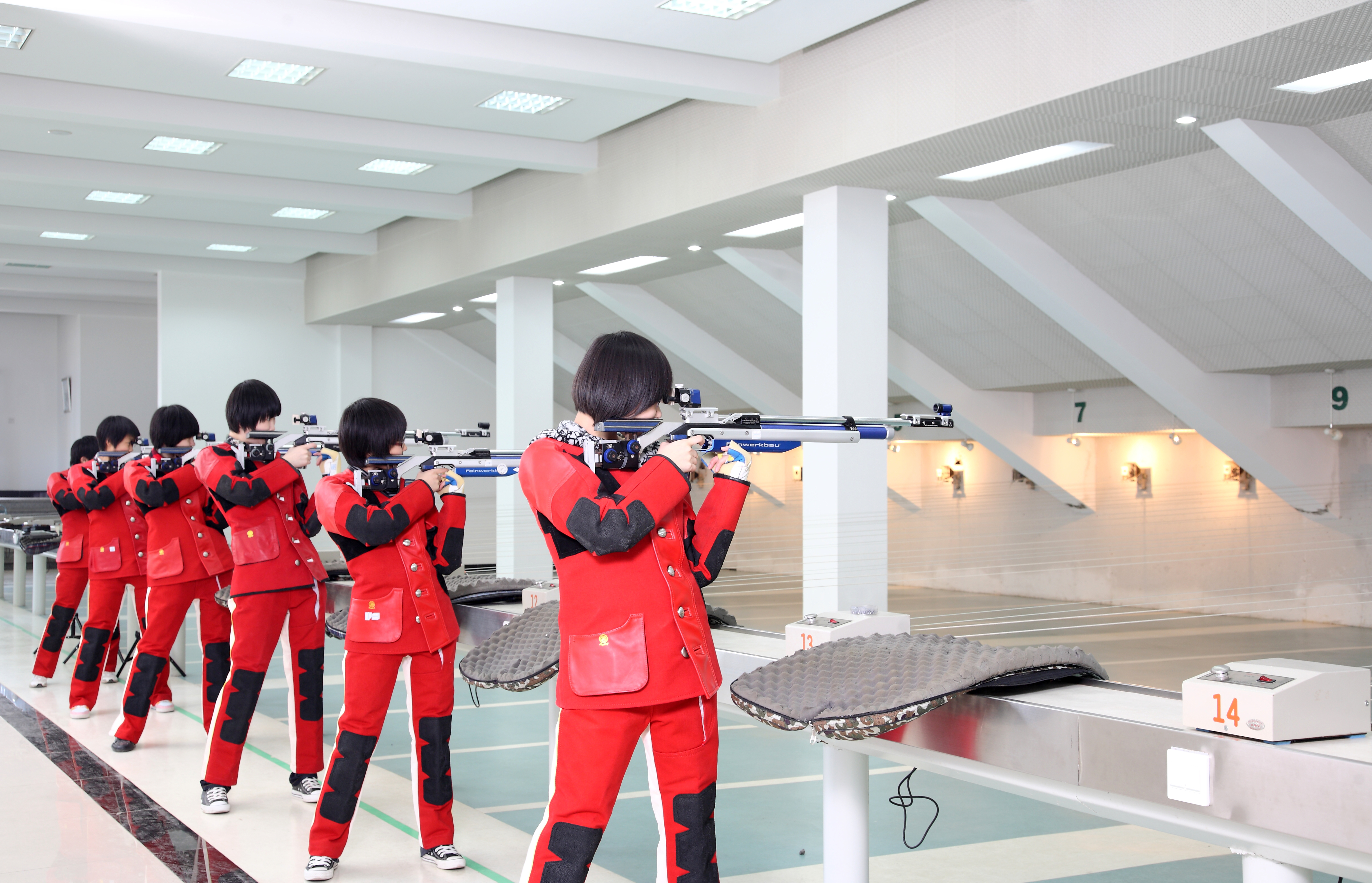 tir-sport